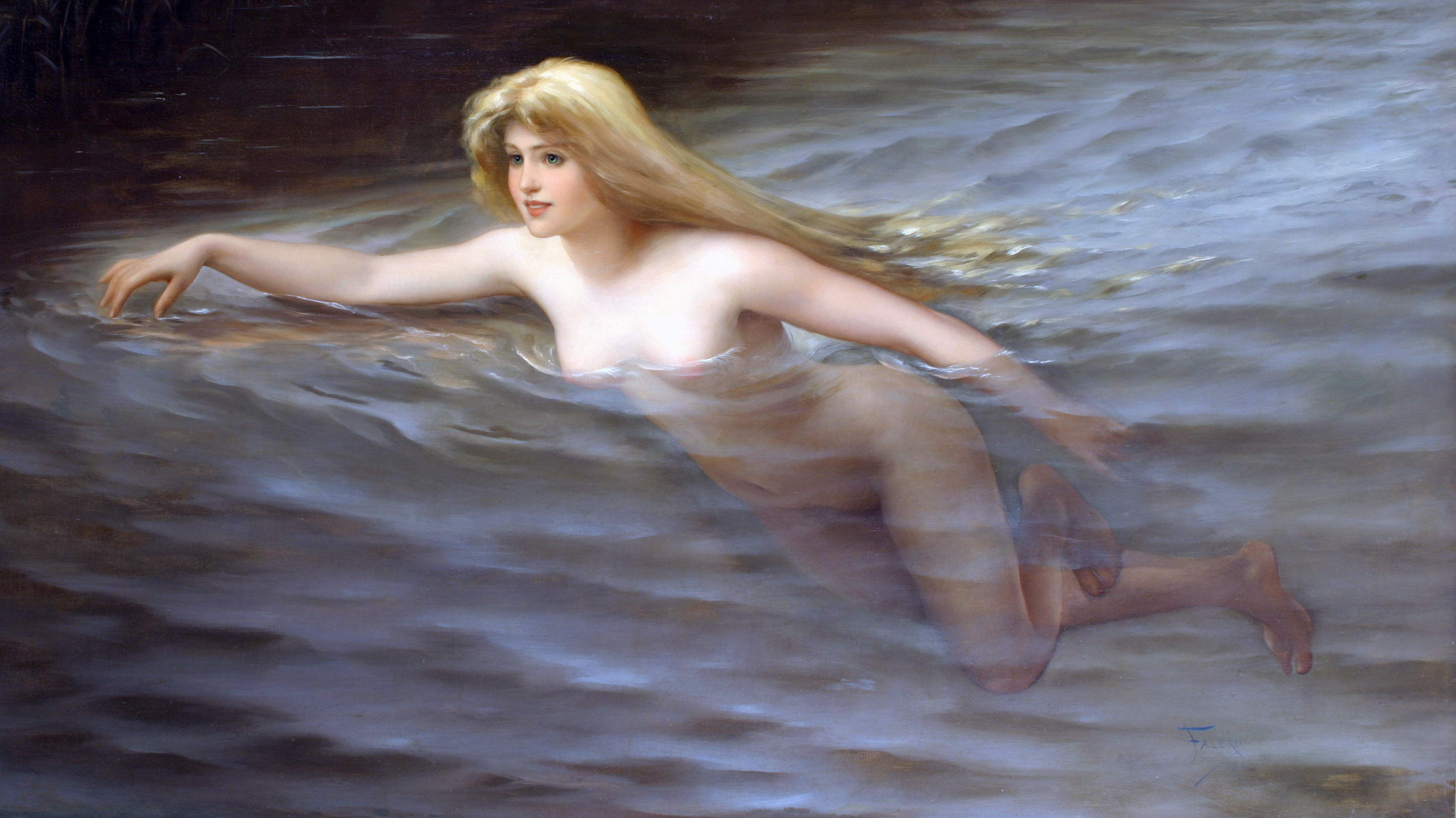 Nymphe